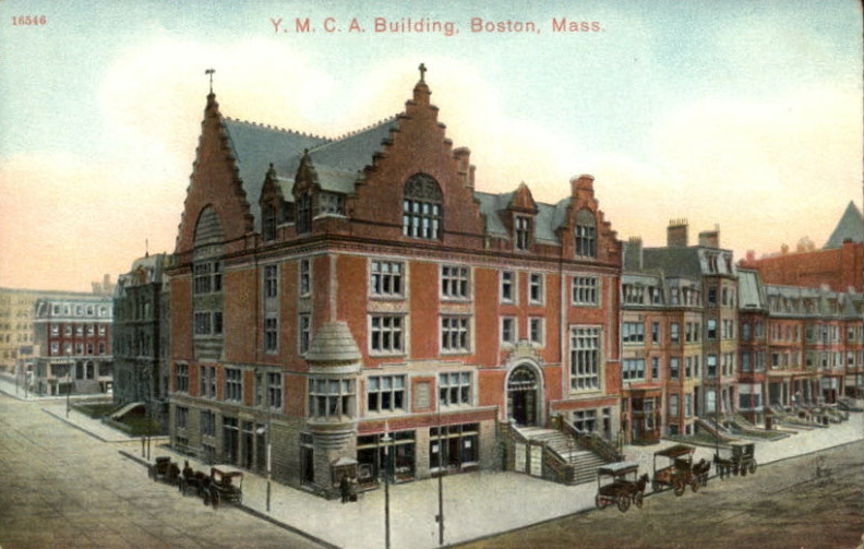 YMCA, Berkeley St., Boston, USA